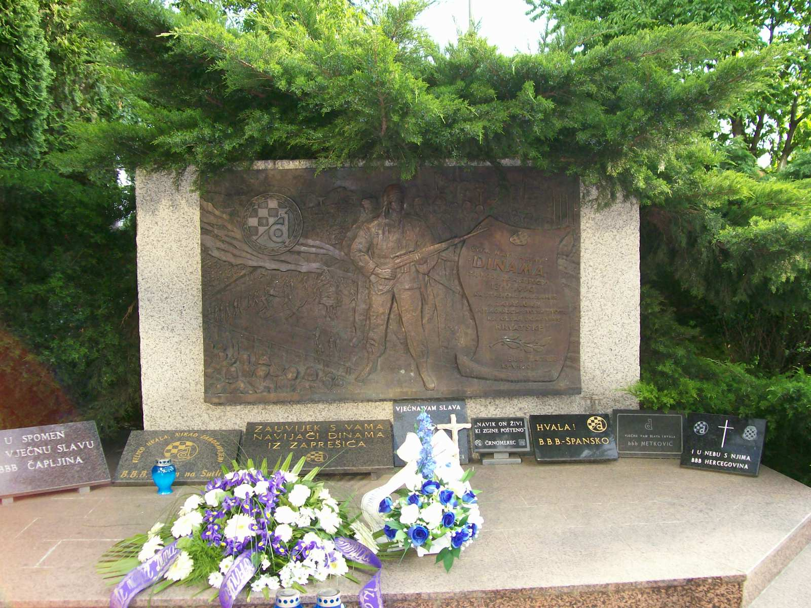 Spomenik poginulim navijačima Dinama pokraj stadiona Maksimir